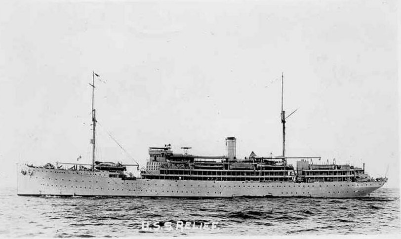 USS Relief (AH-1)